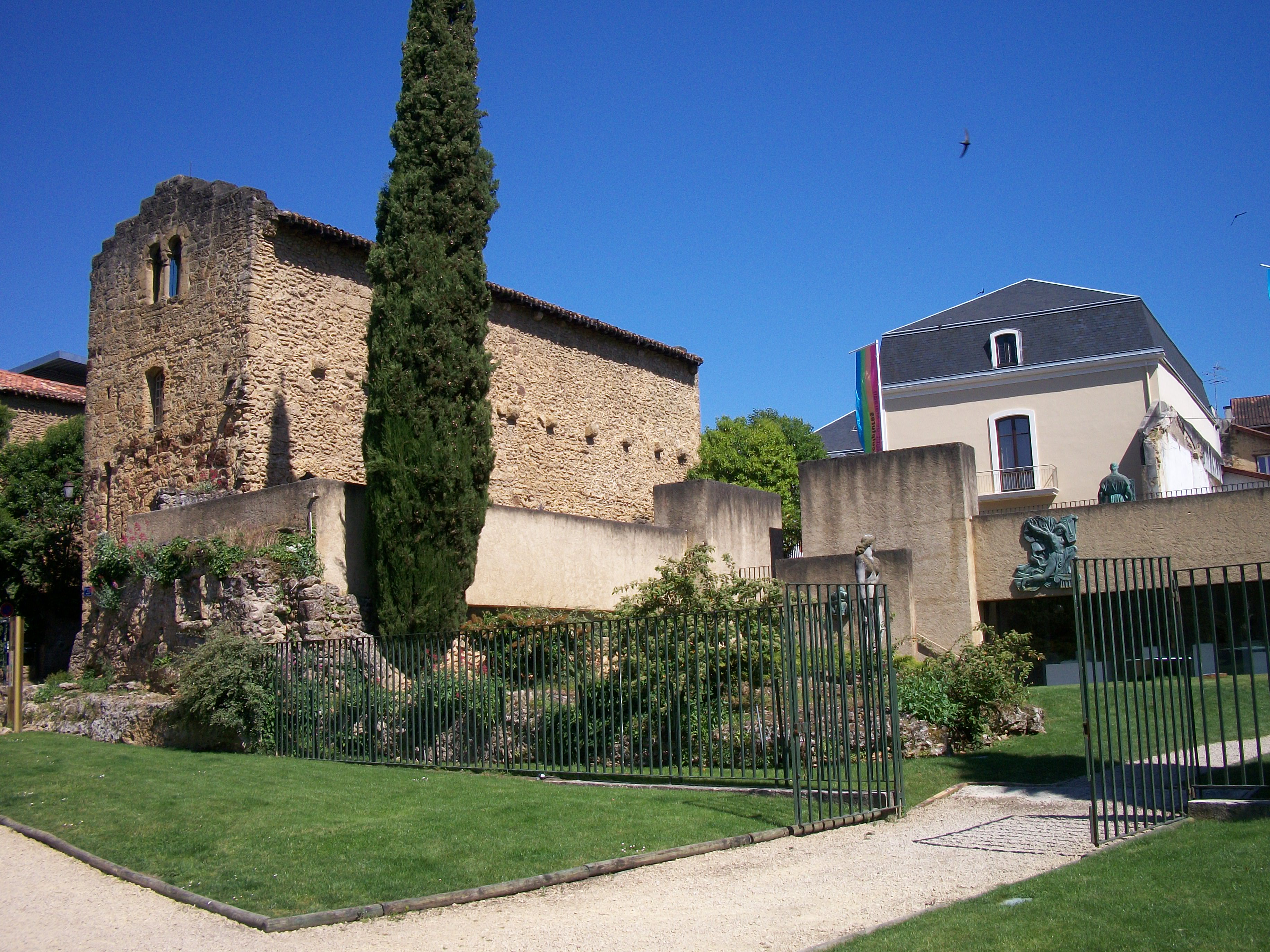 Musée Dubalen (Mont-de-Marsan, France).